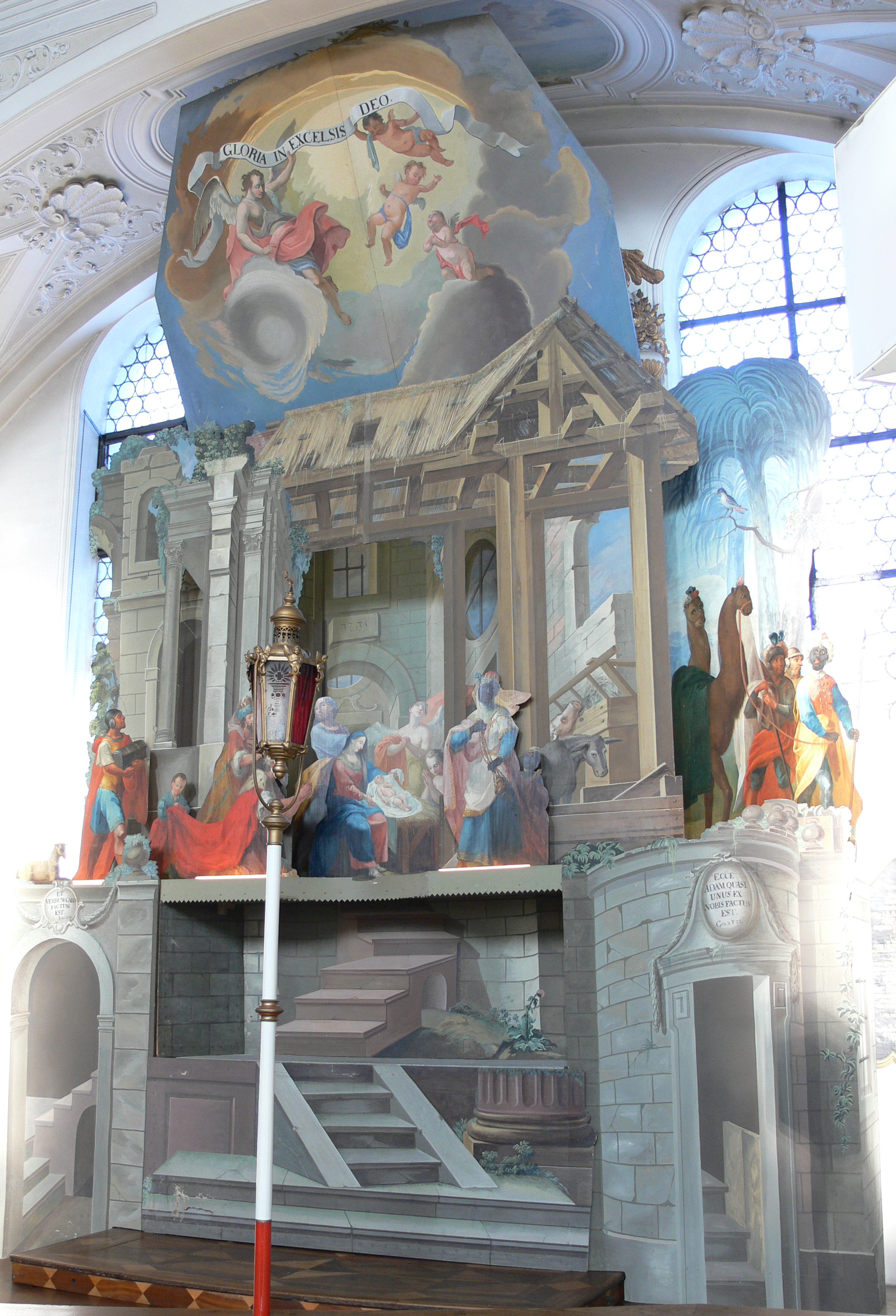 Ravensburg, ehem. Klosterkirche Weißenau, barocke Krippe